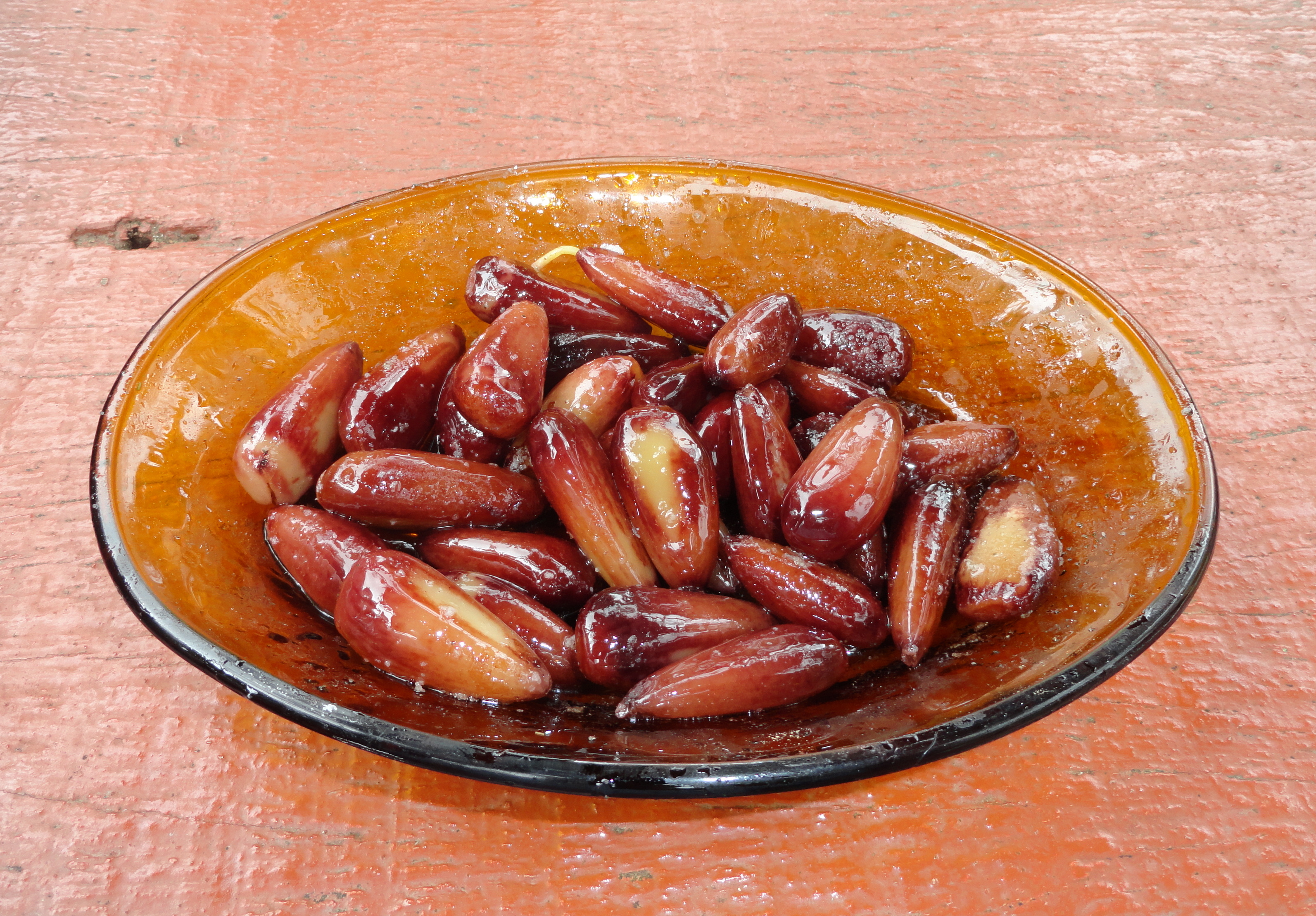 Brasilianische Araukarie Araukarien-Samen als Apéro